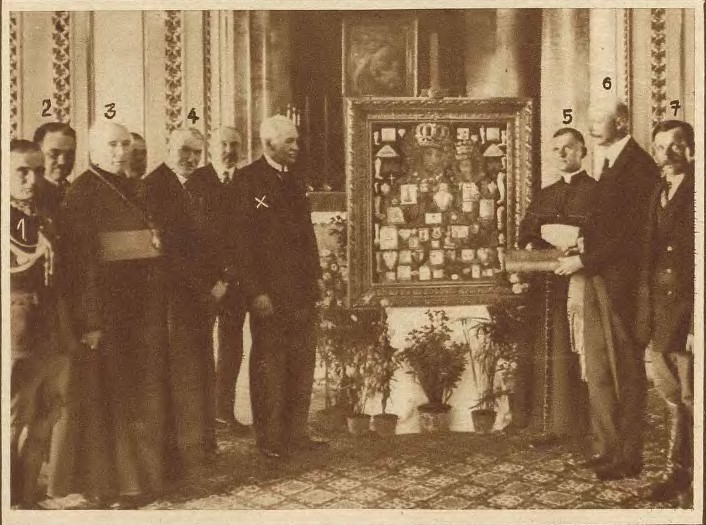 Odzyskany cudowny obraz. Delegacja powiatu Grubieszowskiego wręczyła p. Prezydentowi cudowny obraz Matki Boskiej Hodyszewskiej, niedawno odzyskany po zamieszkach wojennych. Podczas przyjęcia delegacji przez p. Prezydenta obecni byli: pp. płk. szt. gen. Zahorski (1), dr. Skowroński (2), ks. prałat Bojanek (3), prof. dr. Rutkowski (4), ks. kanonik Rogiński (5), Olgierd Markowski (6) i włościanin Antoni Gromada (7).